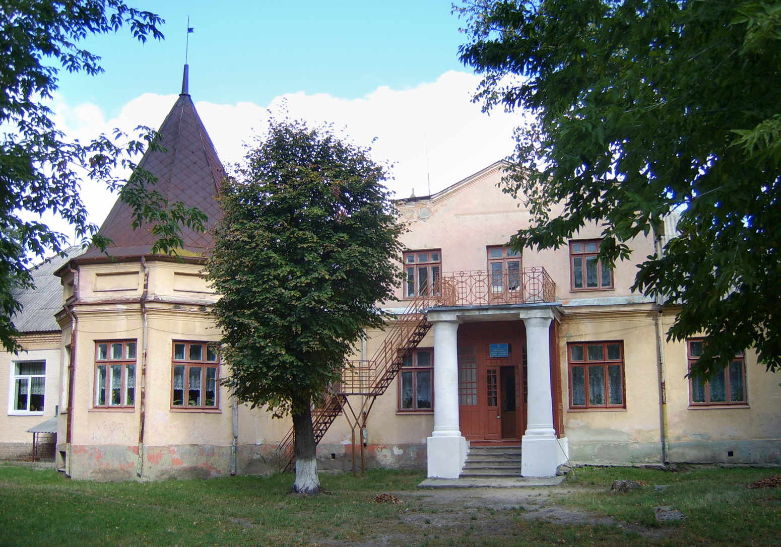 Споруда (мур.), Ковель, вул. С.Бандери, 16